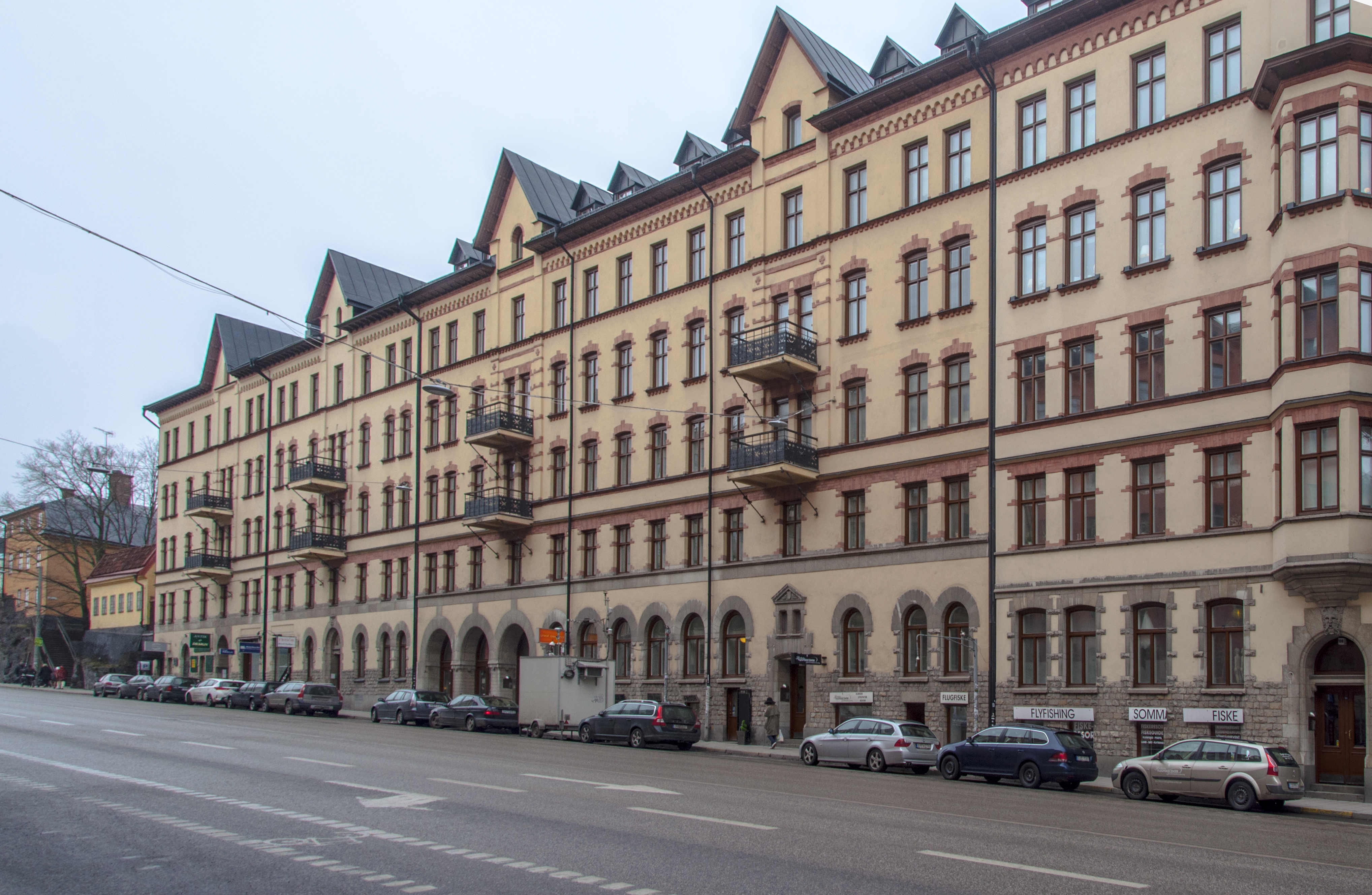 Byggnads AB Manhems arbetarbostäder i kvarteret Tapeten, Hornsgatan 108-116, Nybyggnadsår 1896 - 1899, A. Ericson (Byggherre) Manhem Byggnads AB gm Alm T. (Byggherre) Nils Johan Johansson (Byggmästare) Olof Jansson (Arkitekt)